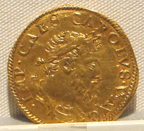 Palazzo Massimo alle Terme